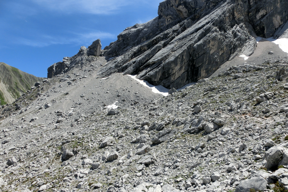 Geröllfeld zwischen Grenzübergang "Gatterl" und Knorrhütte im Wettersteingebirge am Plattsteig zur Zugspitze. Der stark verwitternde Geröllkopf am unteren Ende der Gatterlköpfe deutet auf auftauenden Permafrost an der hier steil ins Reintal abfallenden Nordseite der Plattumrahmung nach dem Rückzug des Gletschers auf dem Zugspitzplatt hin. Plattenschüsse unterhalb des östlichen Gatterlkopfs mit Bänken aus Wettersteinkalk.